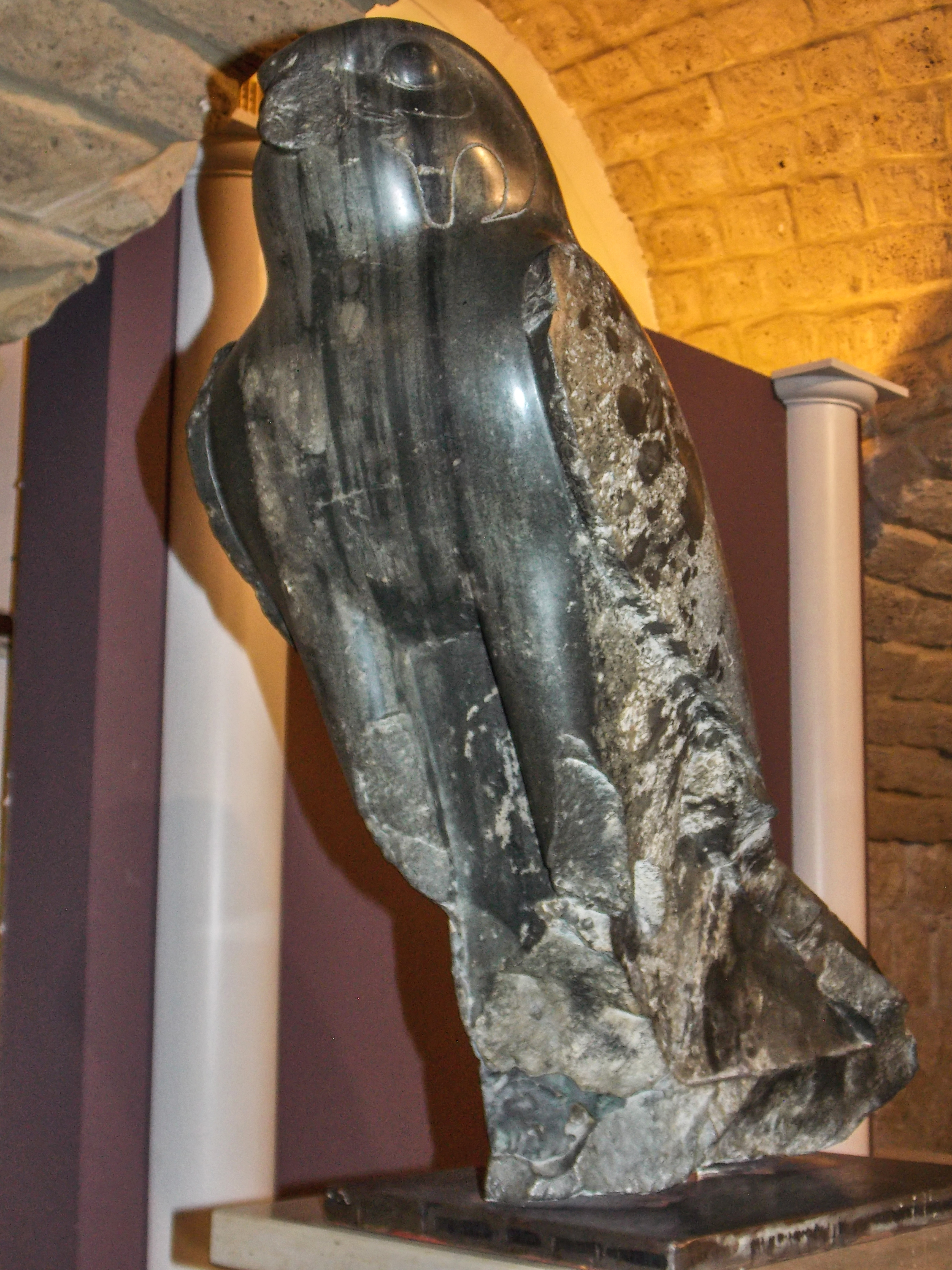 Un reperto del tempio di Iside di Benevento conservato nella sezione egizia del Museo del Sannio, presso il museo ARCOS. Falco Horus di età faraonica.